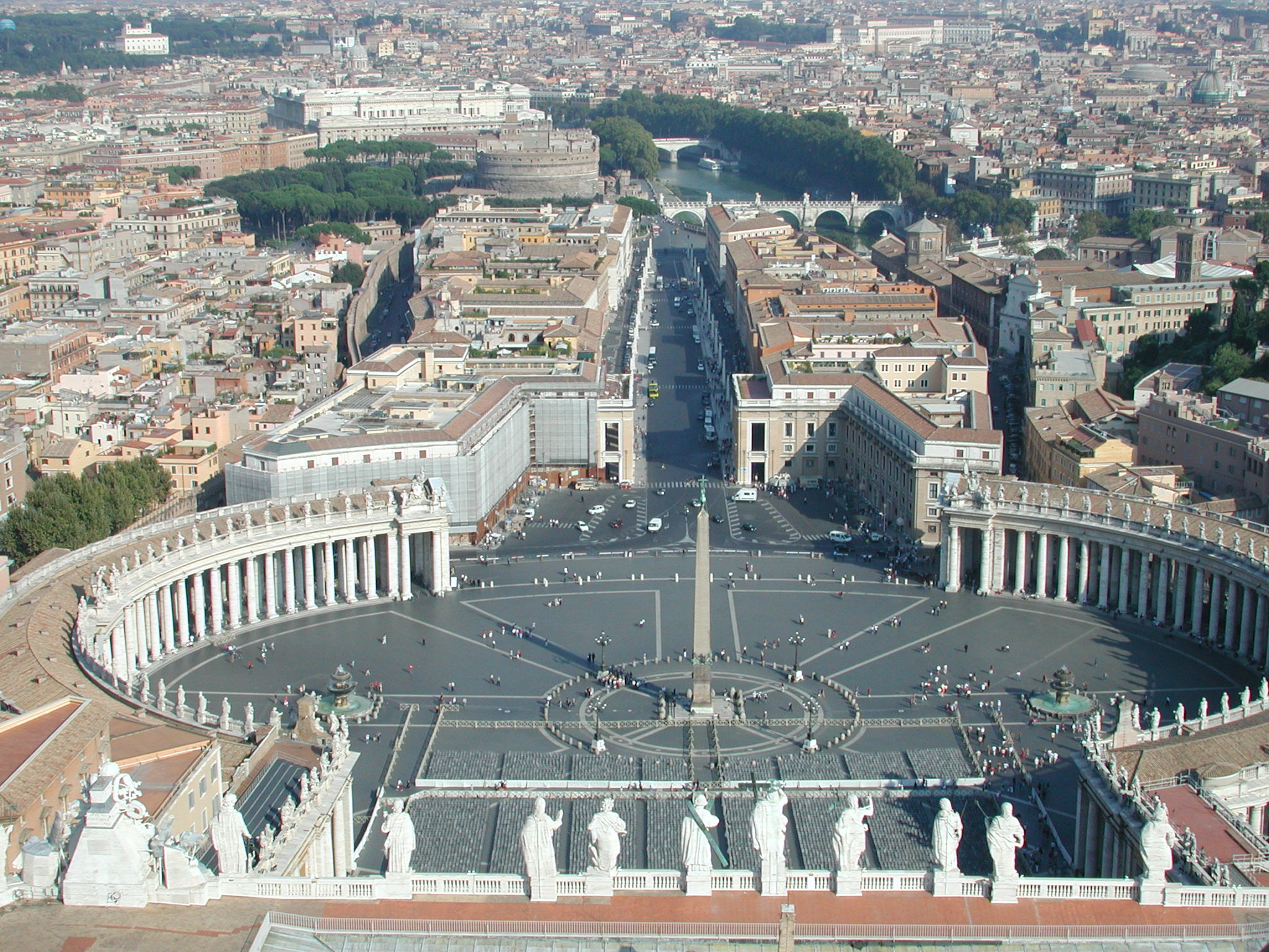 Blick von der Kuppel des Petersdoms in Richtung Innenstadt.